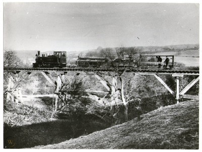 Hunslet steam locomotive 'Leeds No 1'